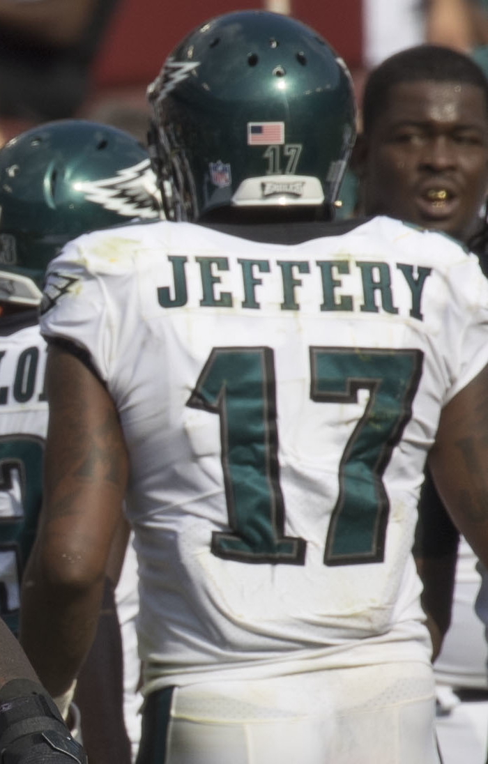 Eagles at Redskins 9/10/17